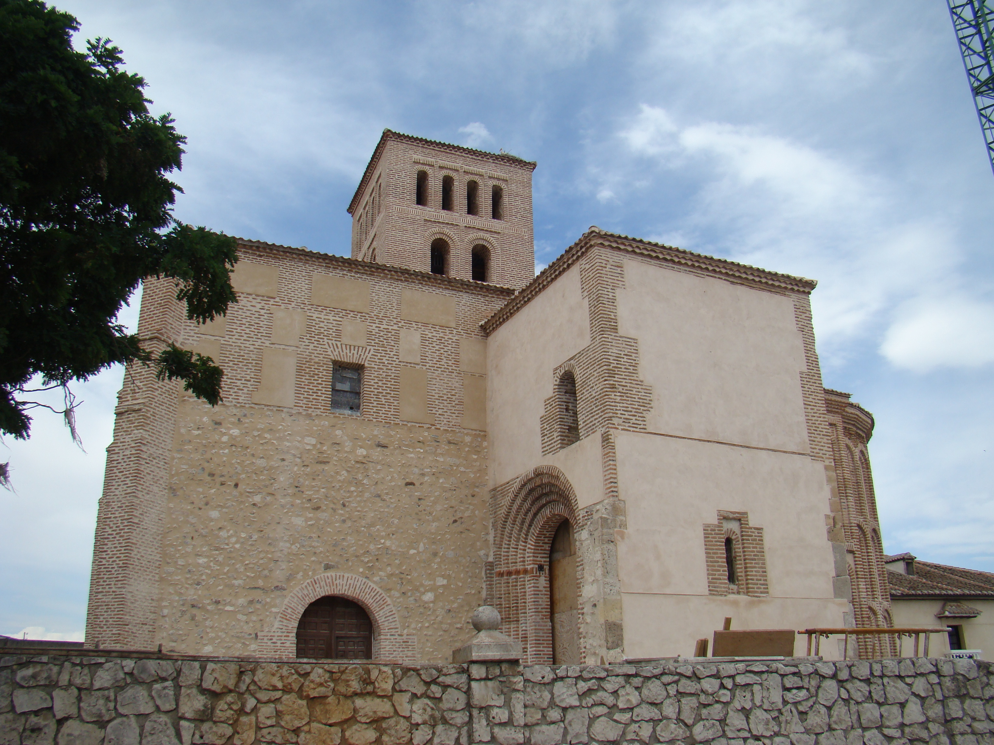 Crucero y dos puertas de la iglesia mudéjar de Samboal en el municipio de Samboal, Segovia (España).